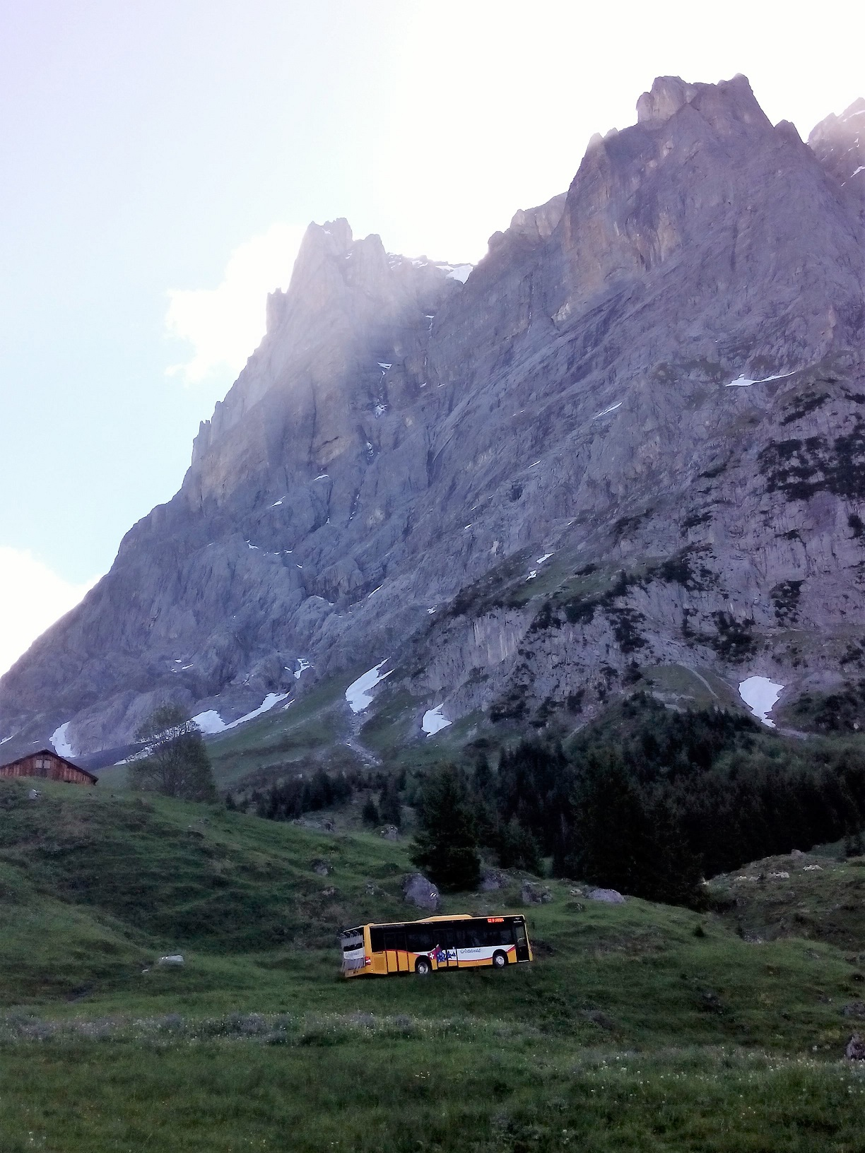 Nähe Lauchbühl